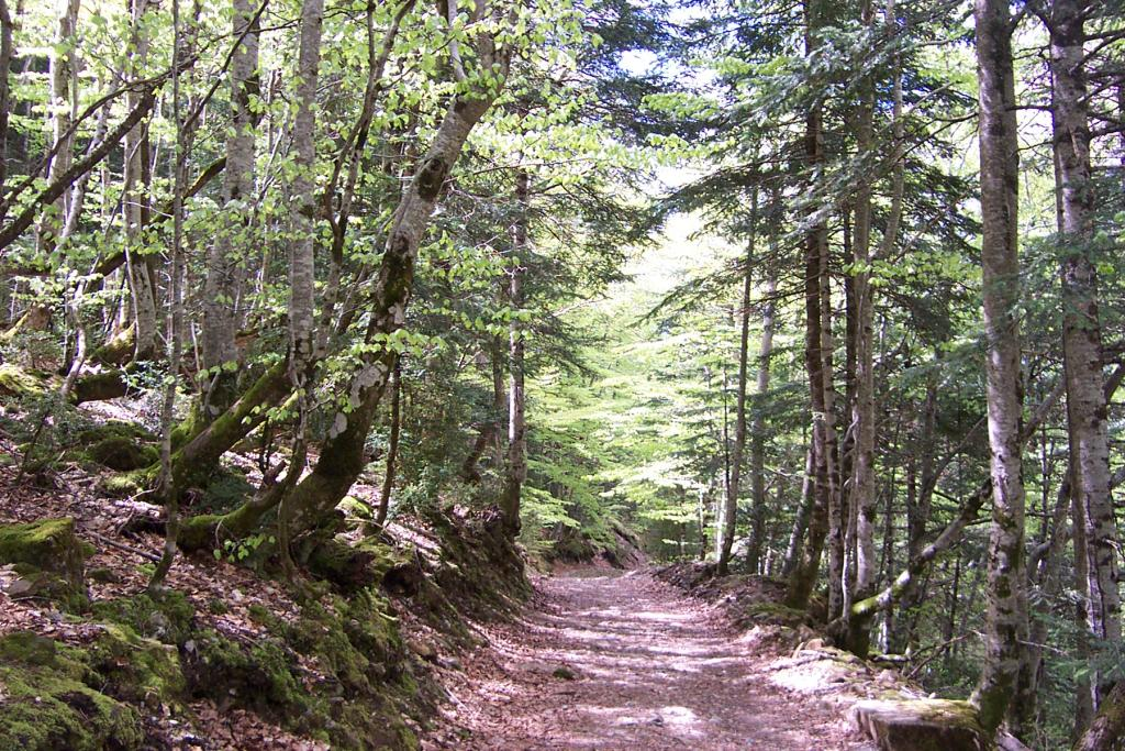 National park of Ordesa and Monte Perdido.